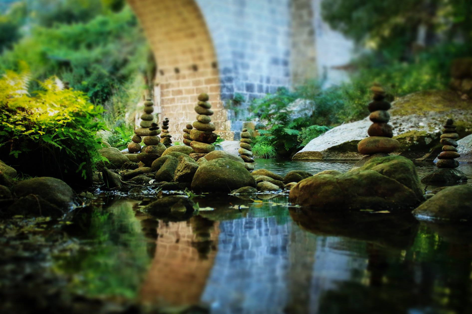 Rio Bestança junto ao Parque de Lazer